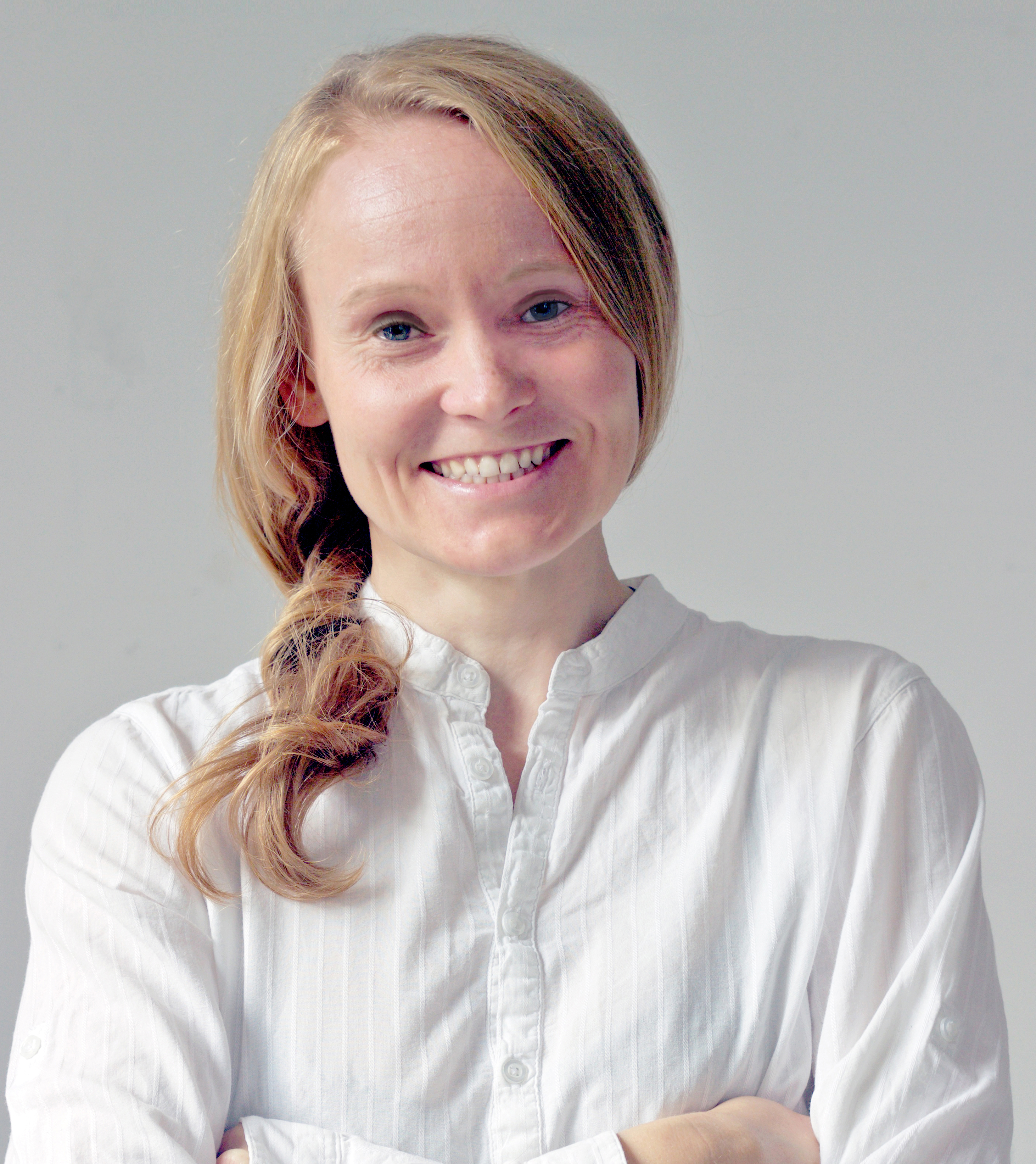 Zdjęcie Magdaleny Błeńskiej, Poseł na Sejm Rzeczypospolitej Polskiej.